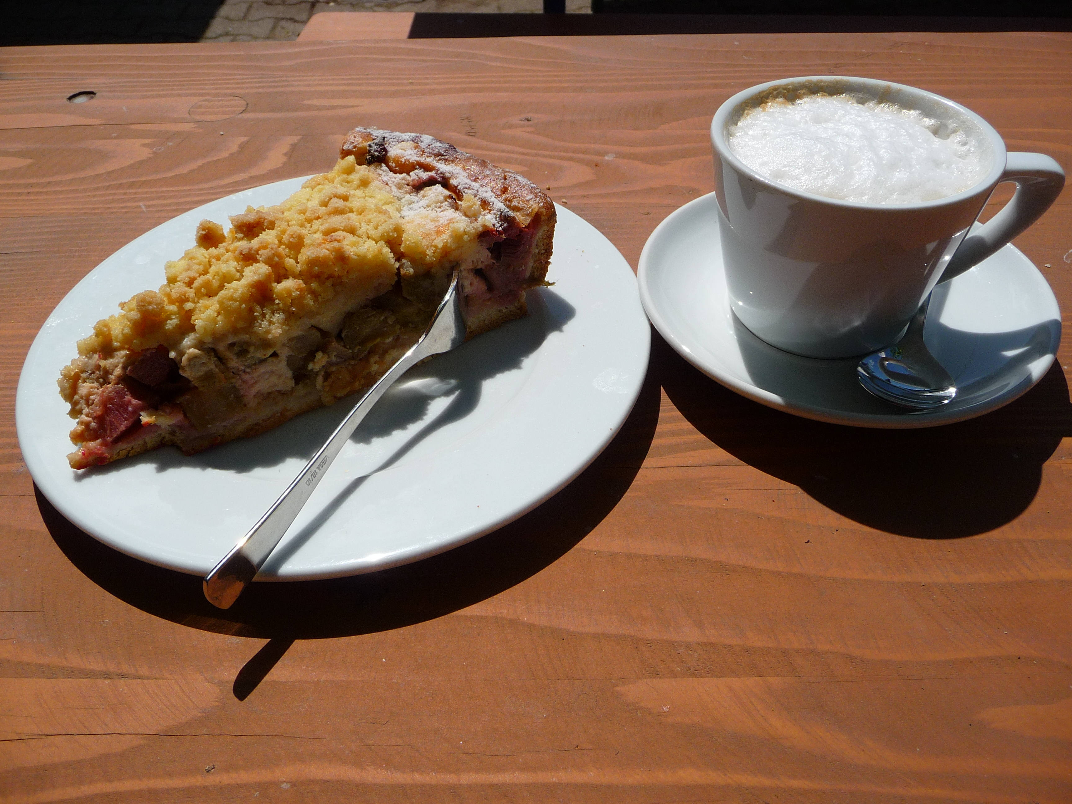 Stück Rhabarberkuchen (aus Rheum rhabarbarum) mit Streuseln, daneben eine Tasse Cappuccino